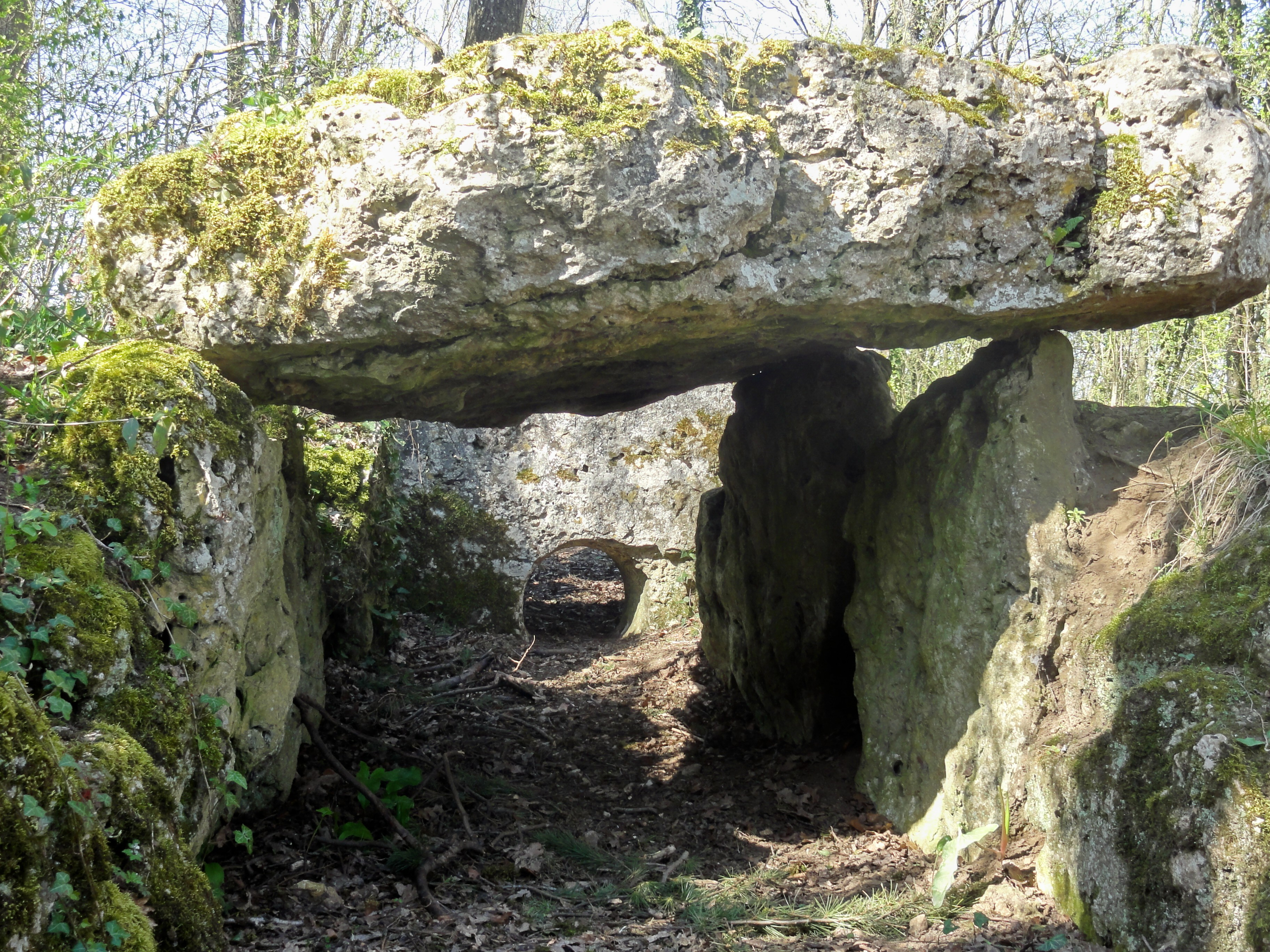 Dolmen de la Pierre aux Fées.